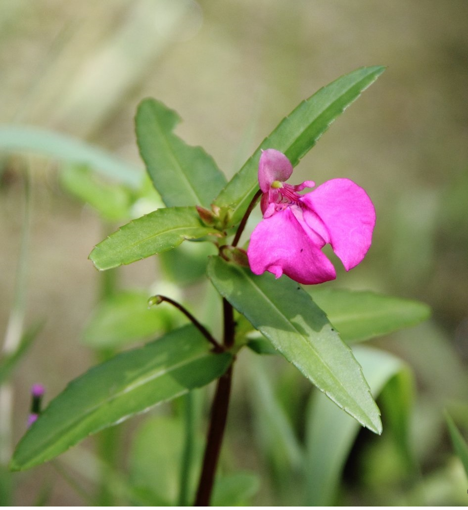 ഒരു ഓണപൂവ്